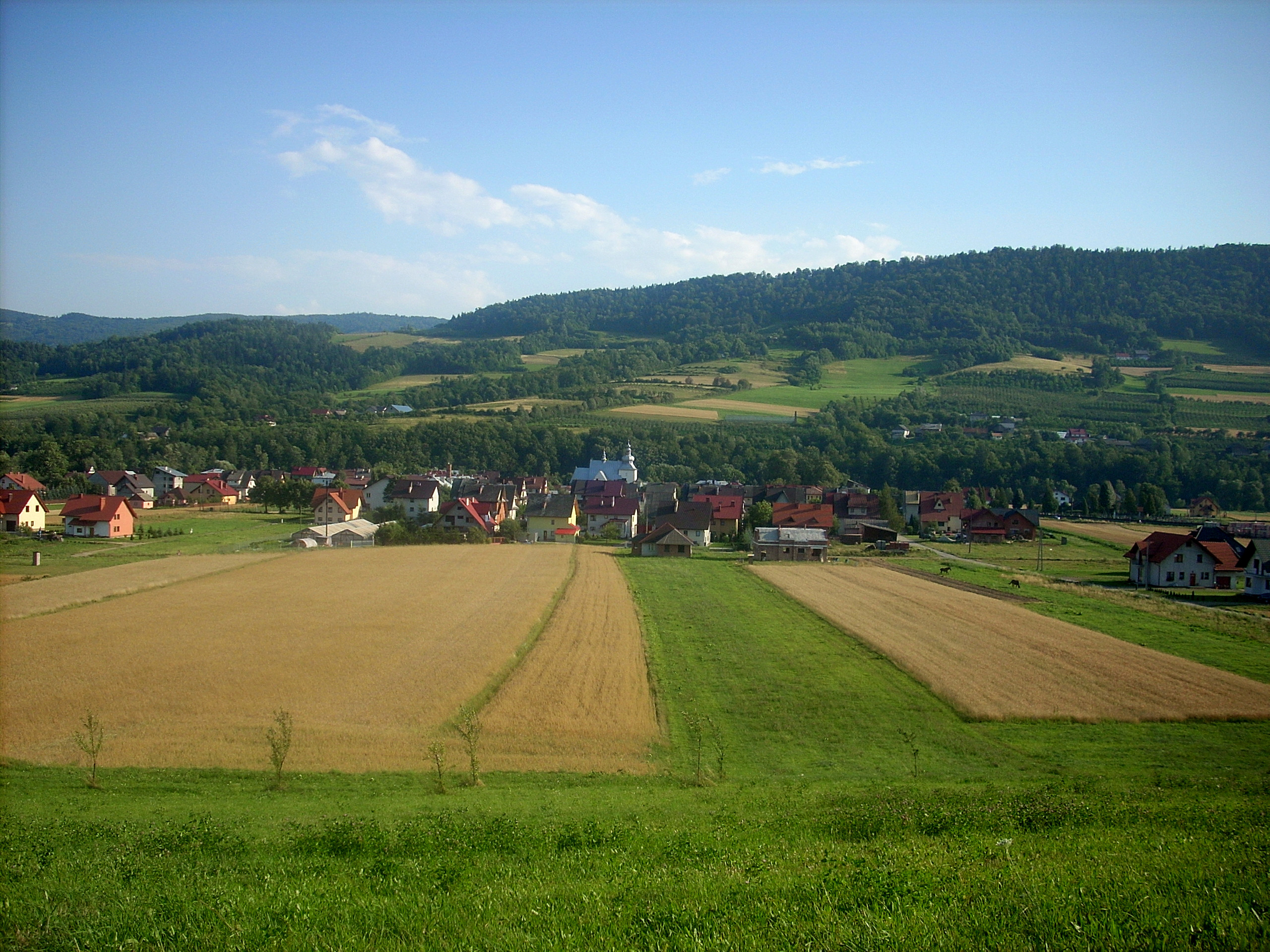 Panorama Ujanowic